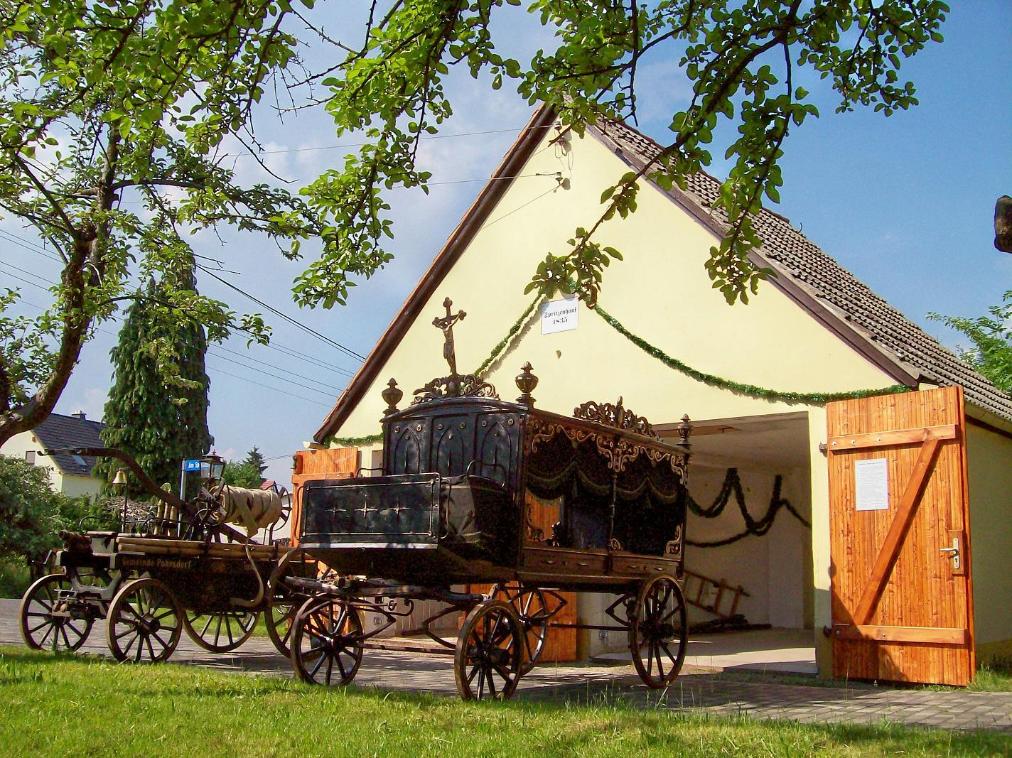 Spritzenhaus Pohrsdorf, Handdruckspritze und Leichenwagen